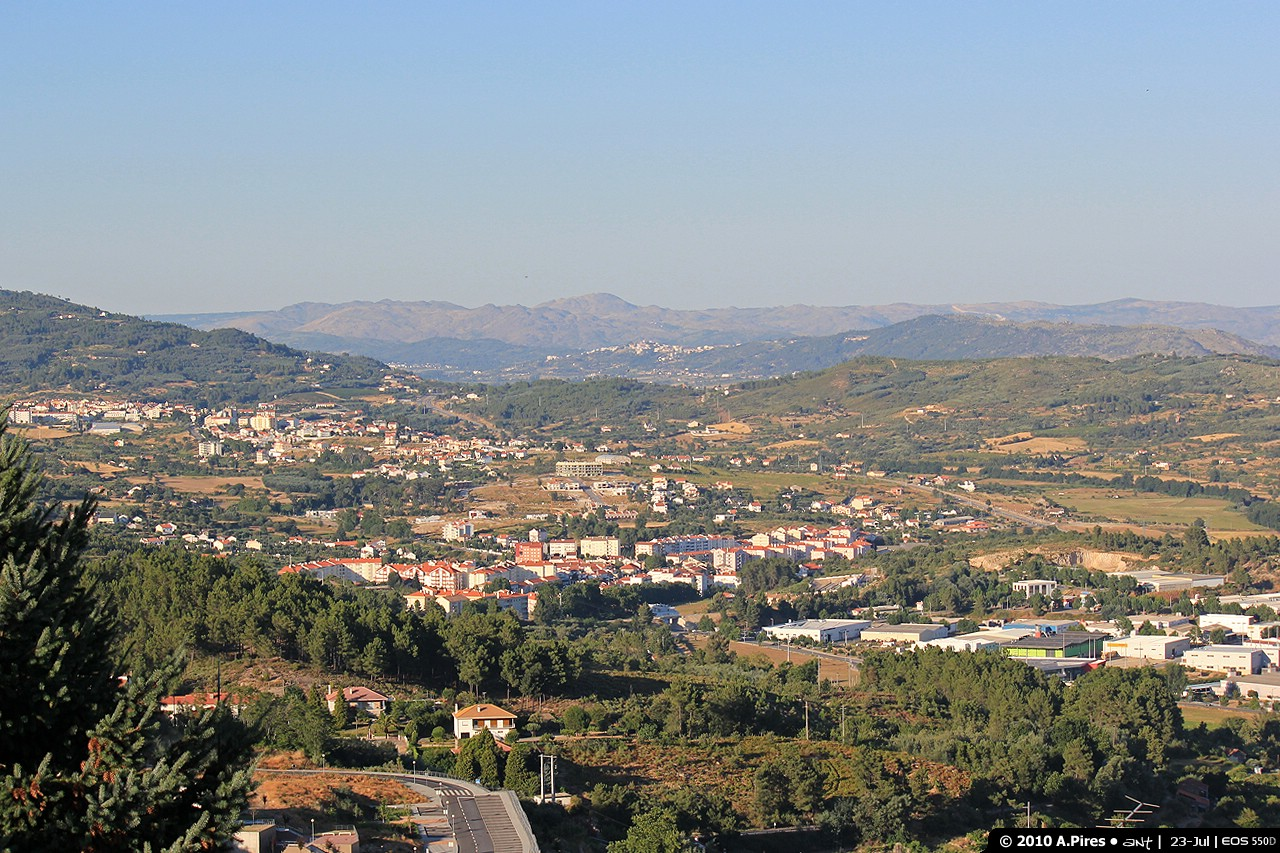 Vista ao final da tarde do Canhoso, Teixoso, Quinta da Cabeça e Belmonte desde a Covilhã. 23 de Julho de 2010